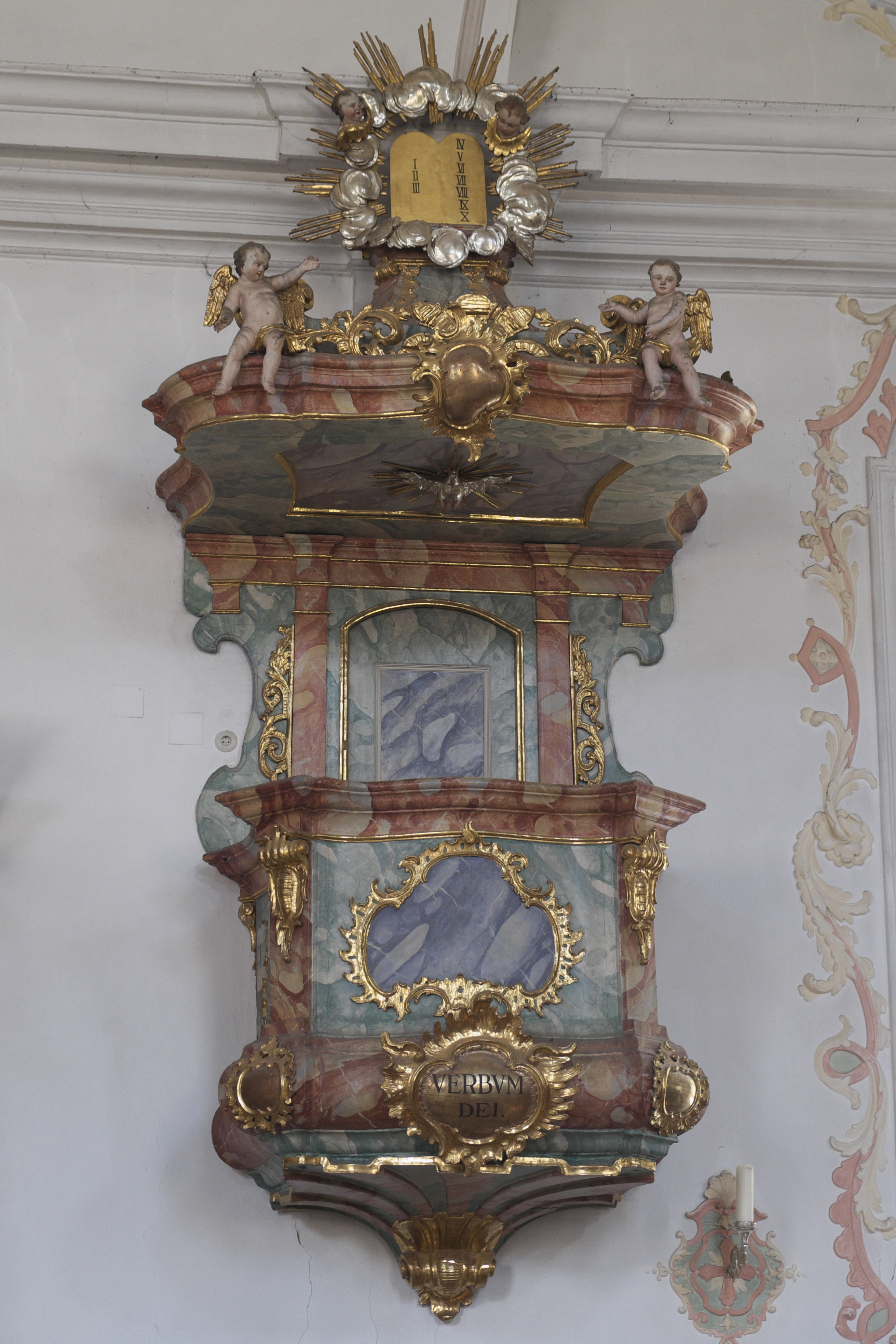 Katholische Pfarrkirche St. Johann Baptist in Riedenburg im niederbayerischen Landkreis Kelheim (Bayern/Deutschland), Kanzel aus der Mitte des 18. Jahrhunderts